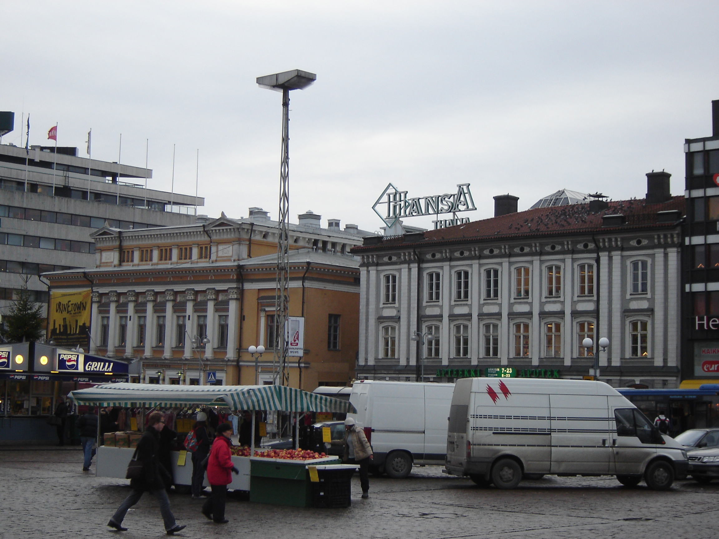 Hansakortteli in Turku, Finland.